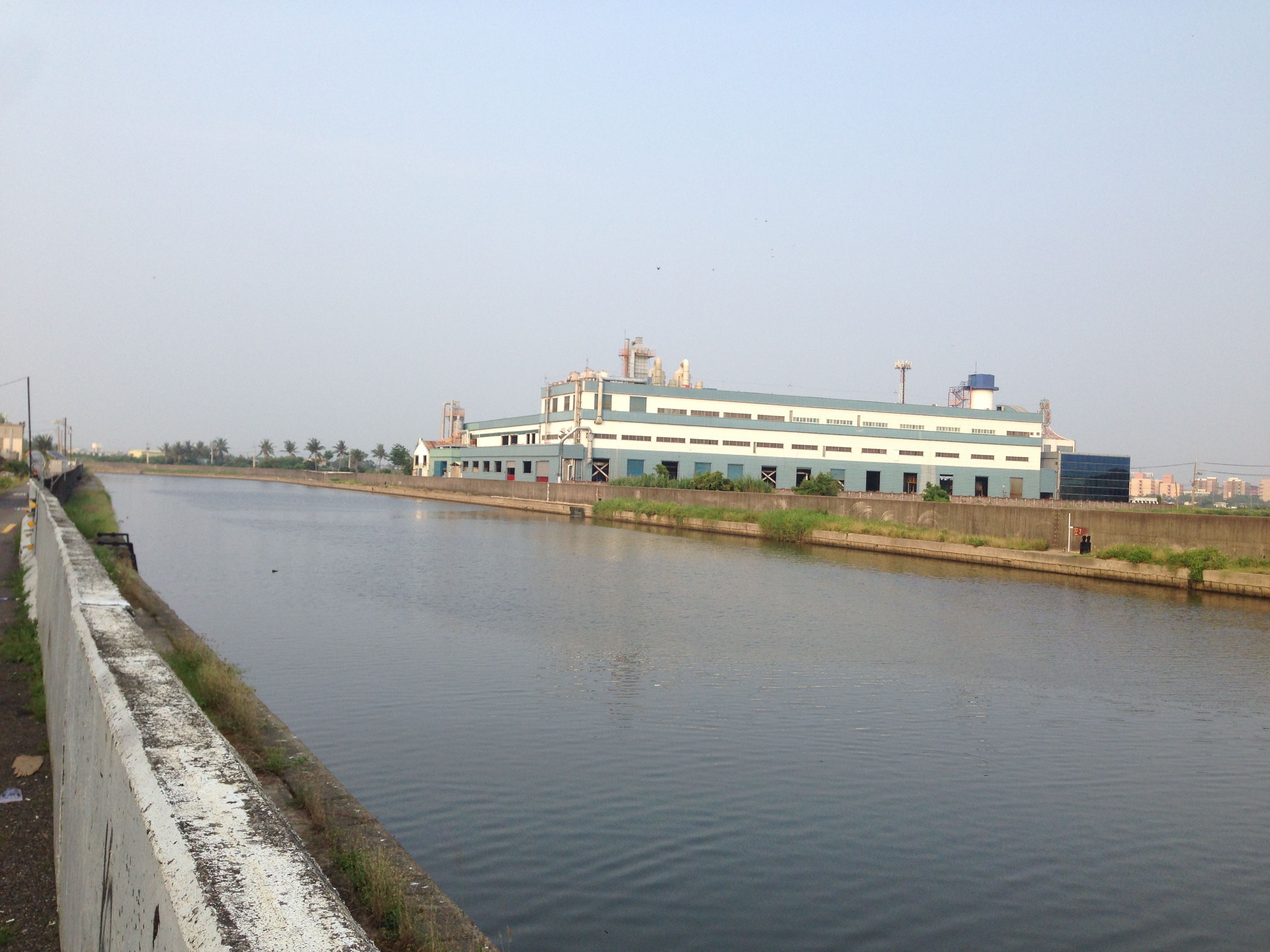 典寶橋旁的典寶溪。